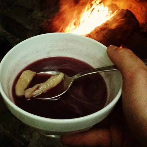 Scattone con cavatelli